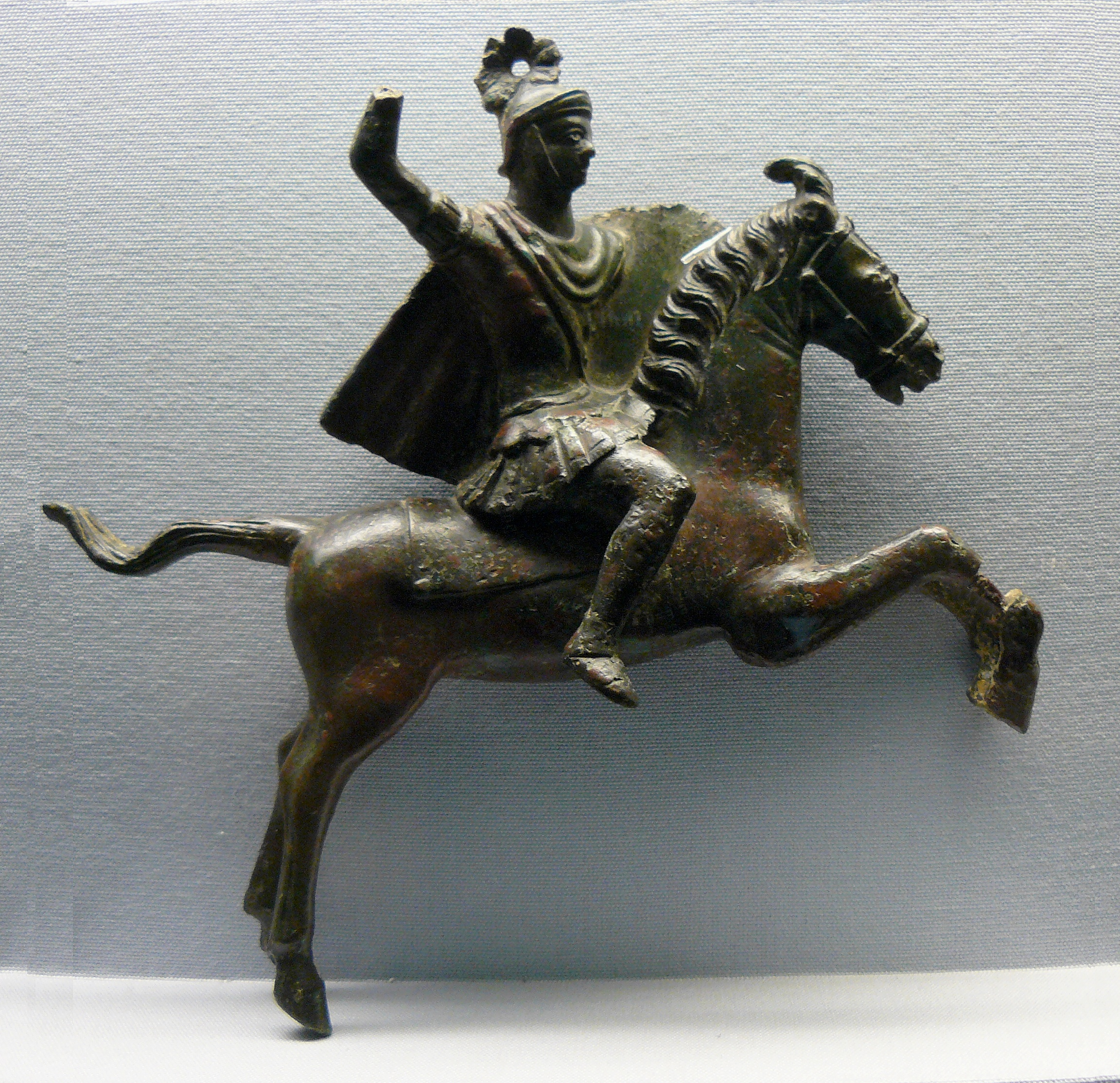 Cavalier romain - tombe à incinération d'un officier romain découverte en 1874 à Chassenard, Allier, France - Ier siècle ap. J.C. - bronze hauteur env. 10 cm. - M.A.N. St-Germain-en-Laye